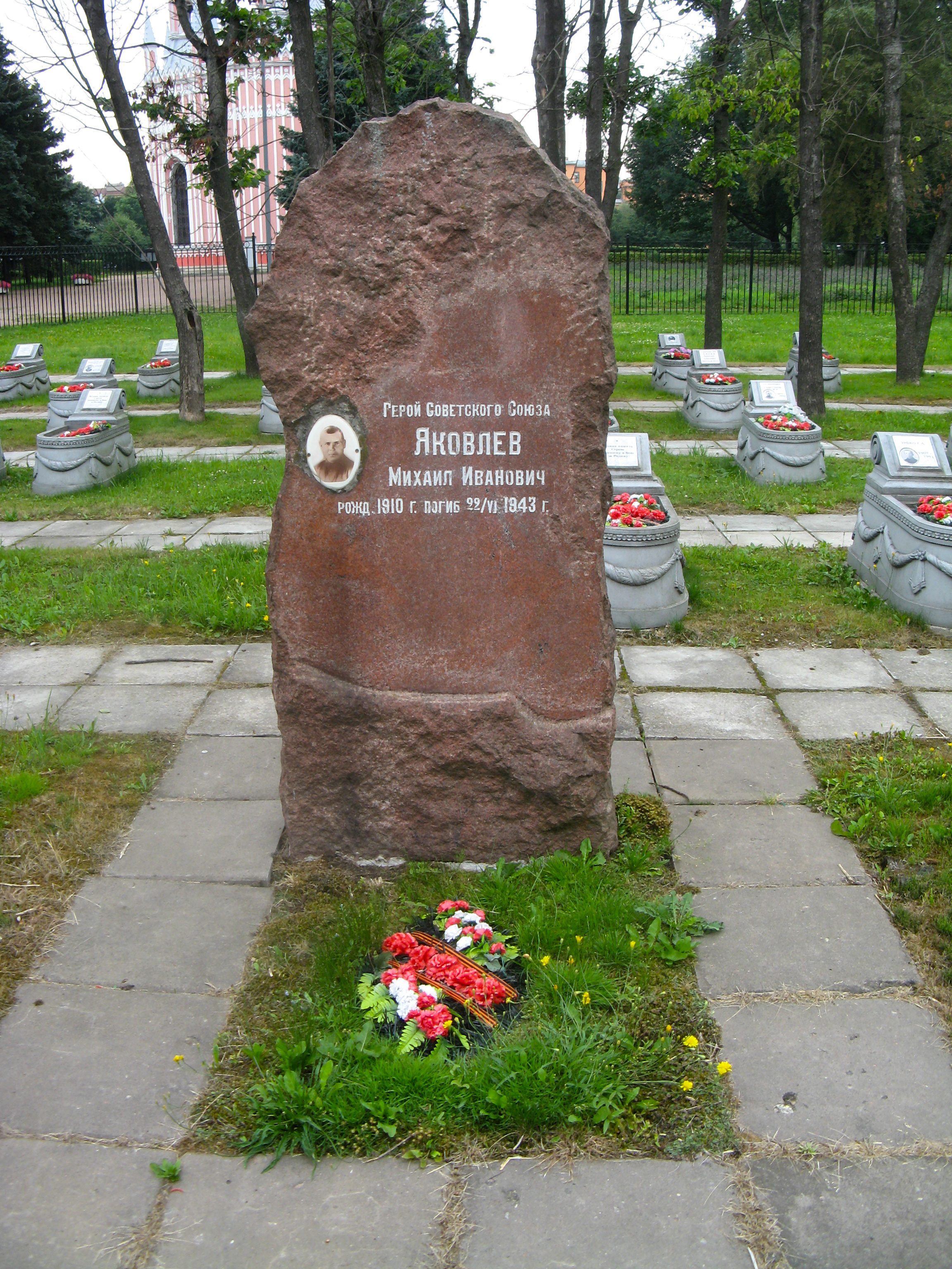 Могила М.И. Яковлева (1910-1943), Героя Советского Союза: улица Ленсовета, 12, Чесменское воинское кладбище, слева от входа, Московский район, Санкт-Петербург